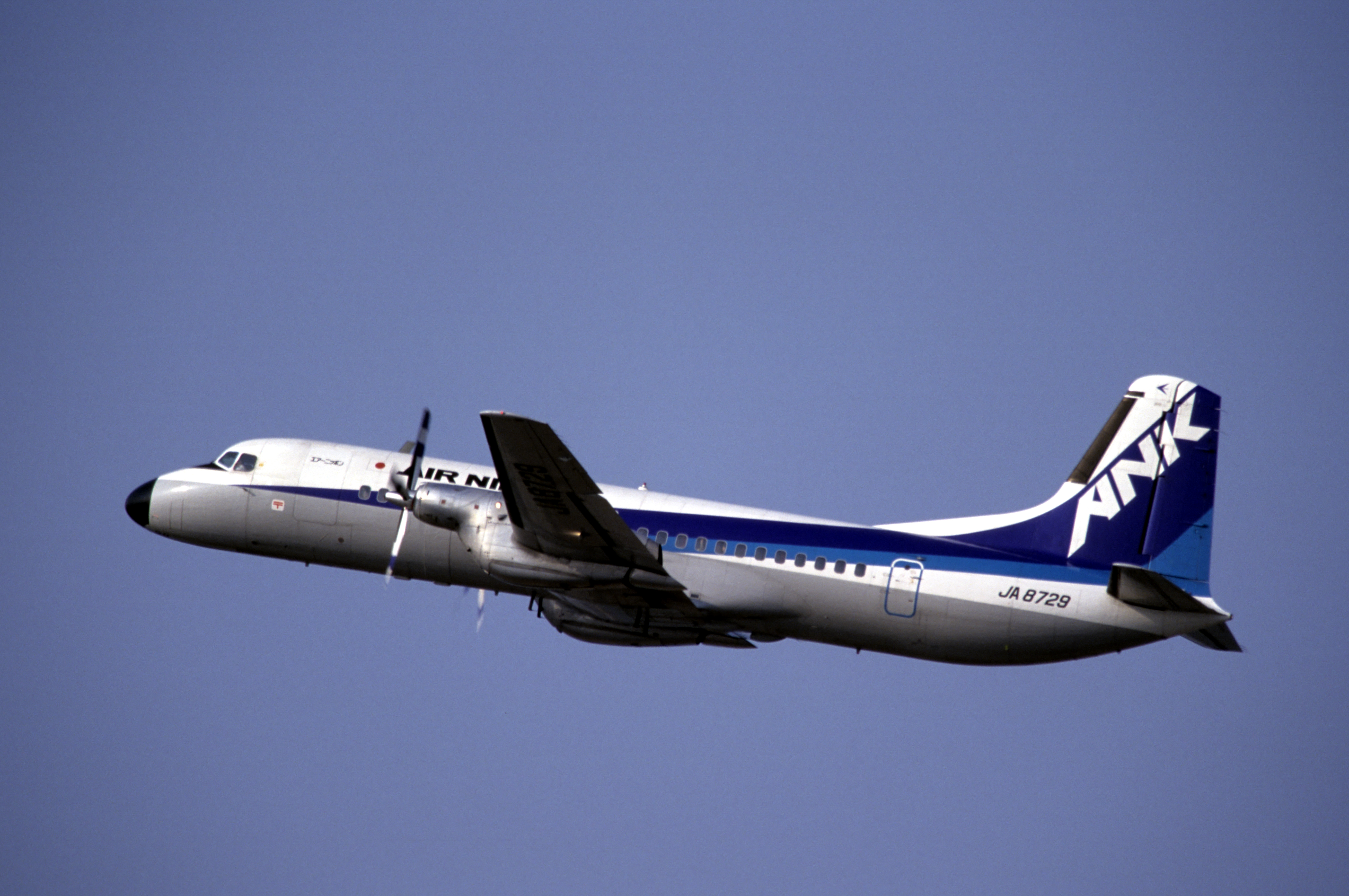 AIR NIPPON YS-11A-213 (JA8729/2097)